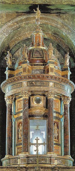 Tabernáculo del altar mayor del Monasterio del Escorial (España); designed by Juan de Herrera andf built between 1579 and 1586 by Jacopo da Trezzo